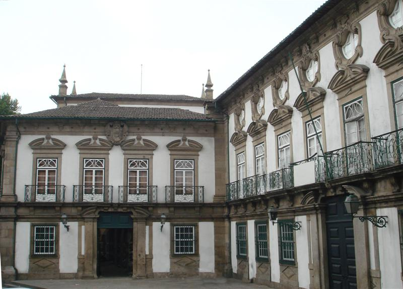 Edíficio do palácio dos Biscaínhos em Braga, onde se encontra o museu dos Biscaínhos. Foto de Jose Goncalves